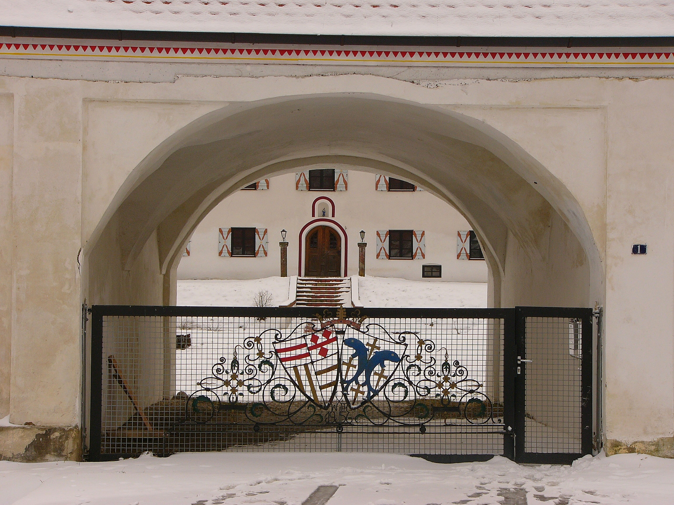 Schlossanlage; im 17. Jahrhundert von Georg Karl Freiherr von Enzdorf an Stelle eines älteren Schlosses erbaut; Wohngebäude, zweigeschossiger Mansardwalmdachbau, im Kern 17. Jahrhundert, im 18. Jahrhundert und später überformt, von einem Graben umgeben; Nord- und Ostflügel der Stall- und Wirtschaftsgebäude mit Durchfahrt und hohen Satteldächern, Nordflügel im 18. Jahrhundert erweitert; östlich Allee mit zwei Torpavillons, 1950; Schlossbräukeller, 17./18. Jahrhundert.This is a photograph of an architectural monument.